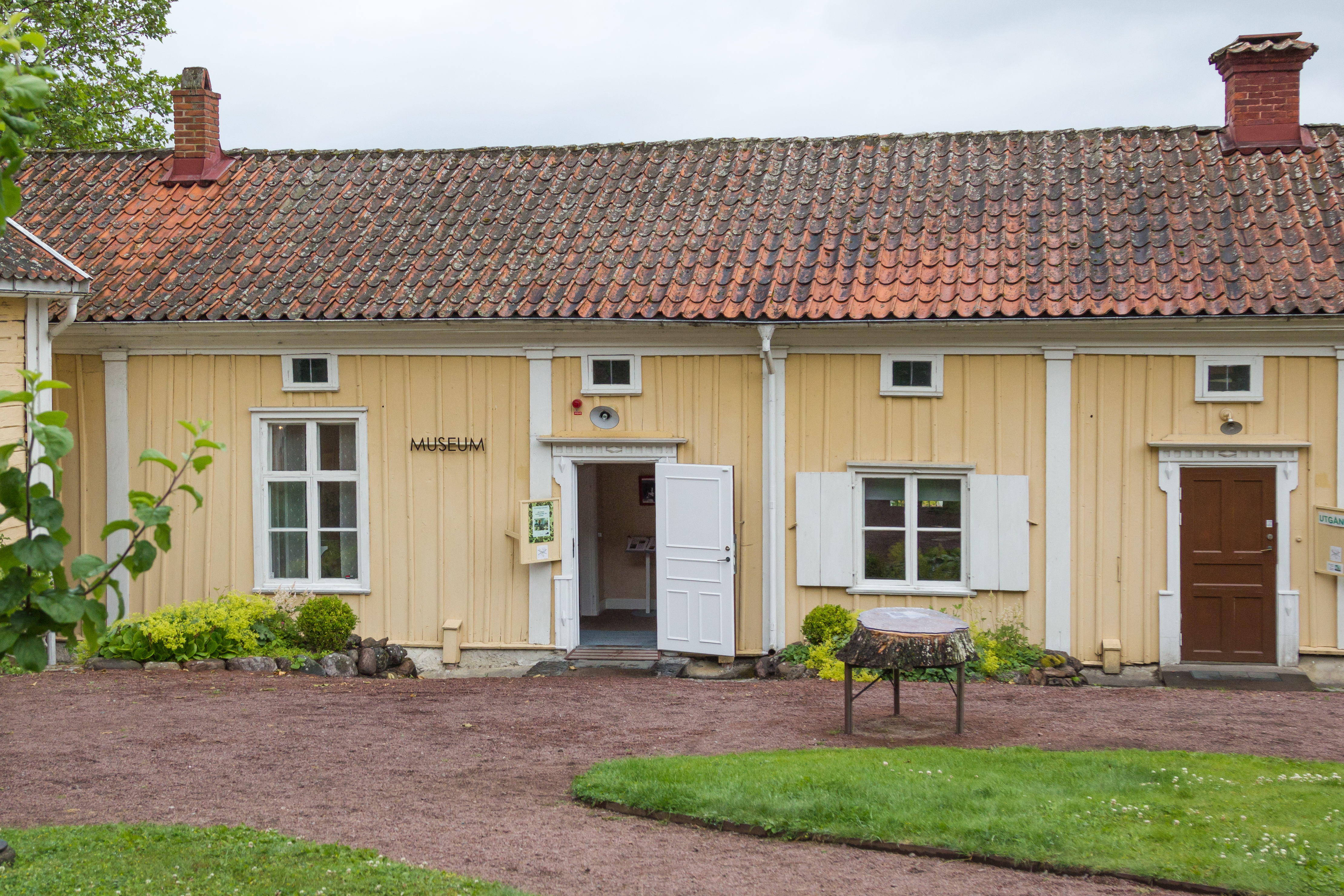 Grenna museum, Gränna, Jönköpings kommun, Jönköpings län, Sverige